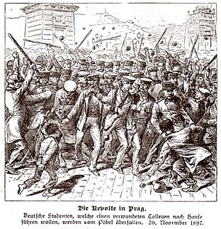 Ausschnitt aus einer Postkarte zu den Badeni-Unruhen 1897 in Prag